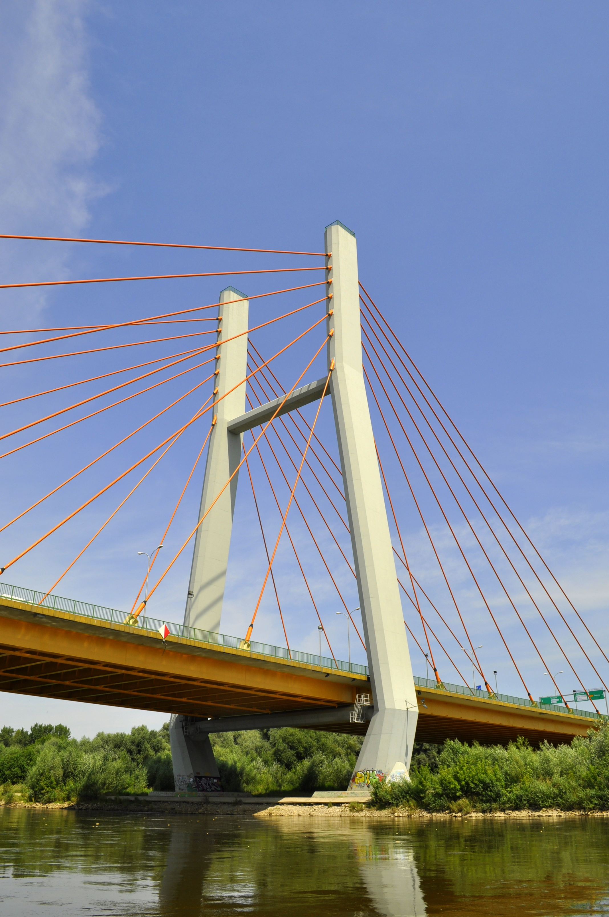 The Siekierkowski Bridge in Warsaw.